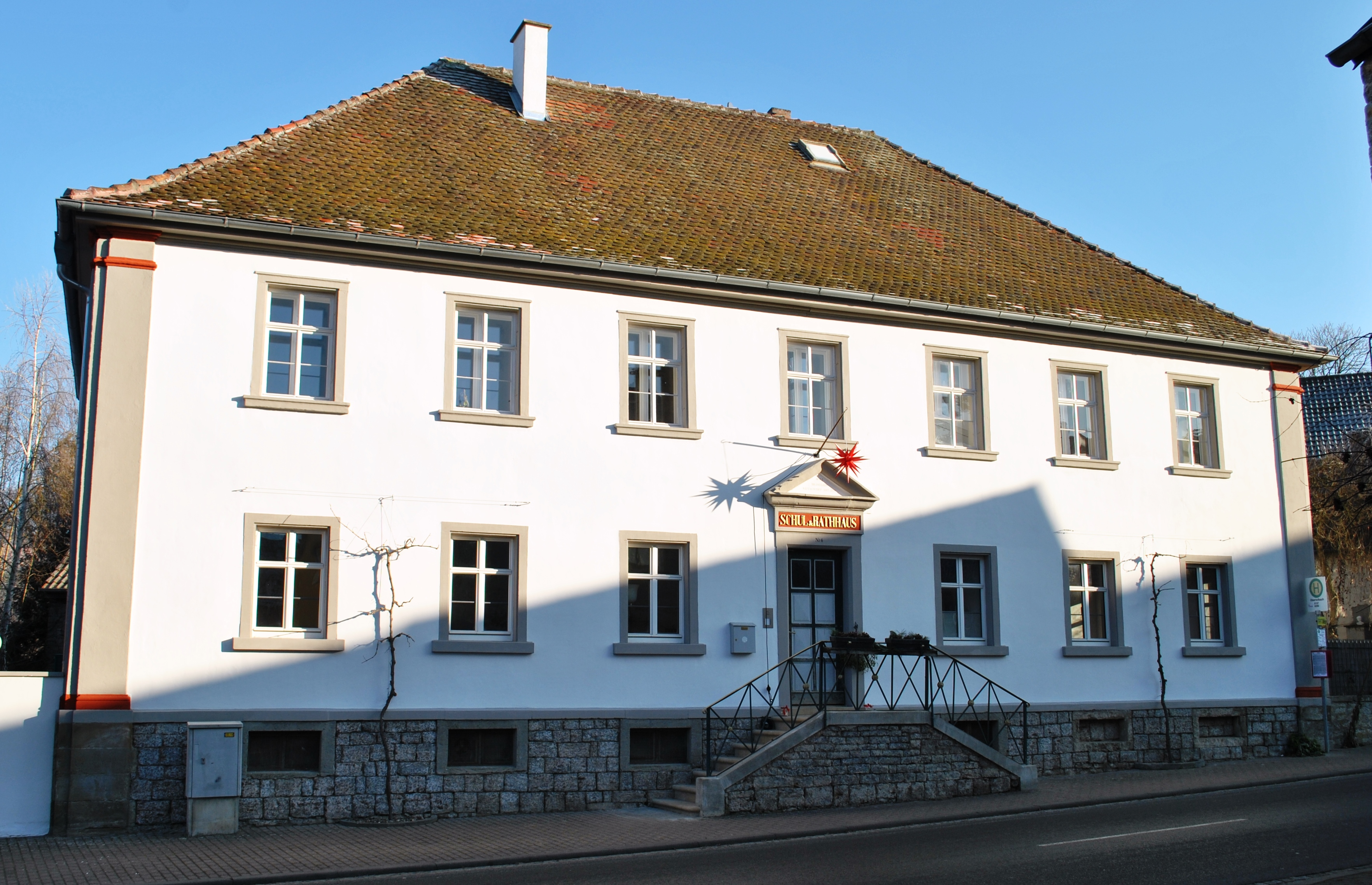 Ehemaliges Schul- und Rathaus Zweigeschossiger traufständiger Walmdachbau mit Eckpilastern, frühes 19. Jahrhundert D-6-75-174-277